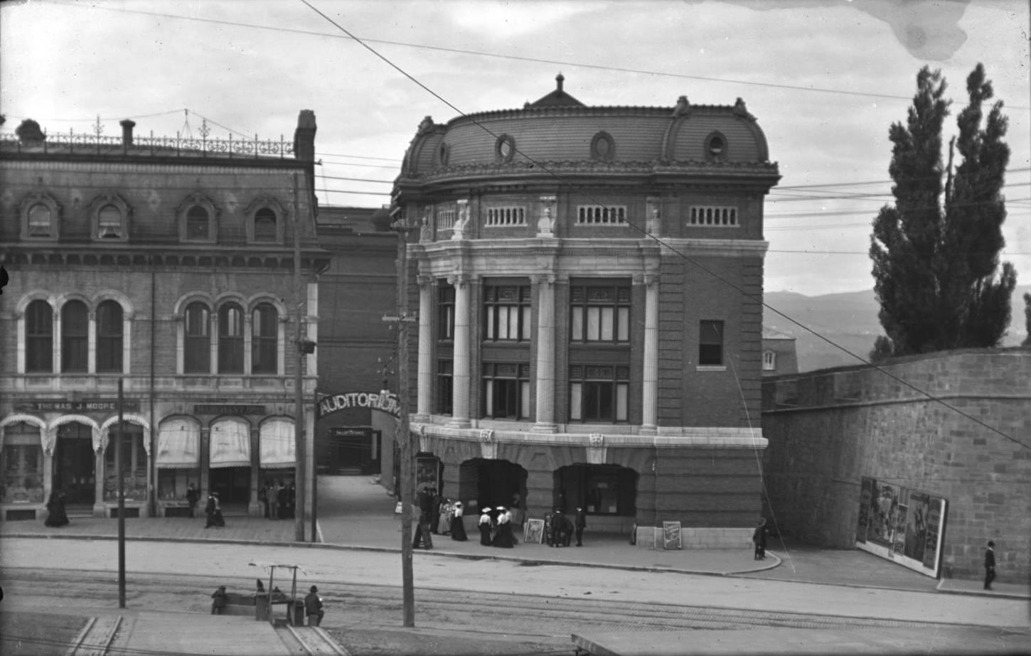 Édifices sur le côté nord de la rue Saint-Jean, face à la place d'Youville, à Québec. De gauche à droite sur la photo : une partie de l'édifice YMCA, le théâtre Auditorium, qui sera renommé le Capitole en 1930, et une partie du mur des fortifications près de la porte Saint-Jean. La partie droite de l'édifice YMCA sera démolie pour faire place au cinéma de Paris, qui sera construit en 1948 entre l'édifice YMCA et le Capitole.